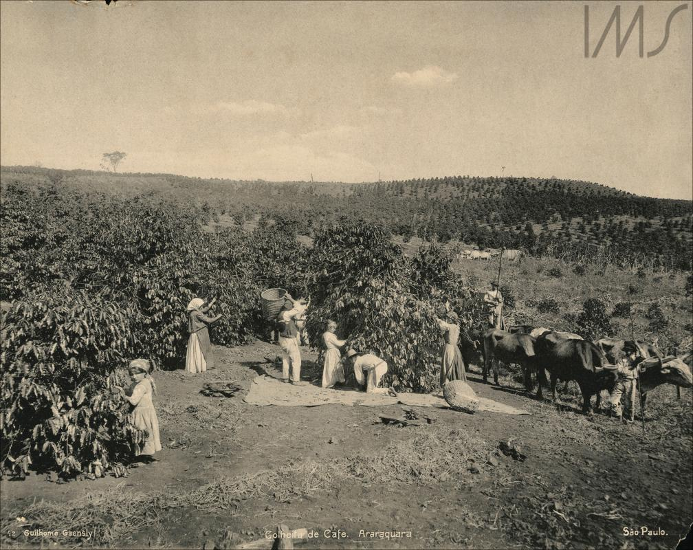 Colheita de Café Gaensly, Guilherme Data: 1900 circa Descrição: MONOCROMÁTICA i:22,0 cm x 27,5 cm Colotipia/ Pigmento Assuntos: GILBERTO FERREZ Animais Transportes Pessoas Trabalho Horizontal Diurna Flora / Vegetação Externa Localidade: Araraquara Araraquara SP Brasil Fonte: Gilberto Ferrez